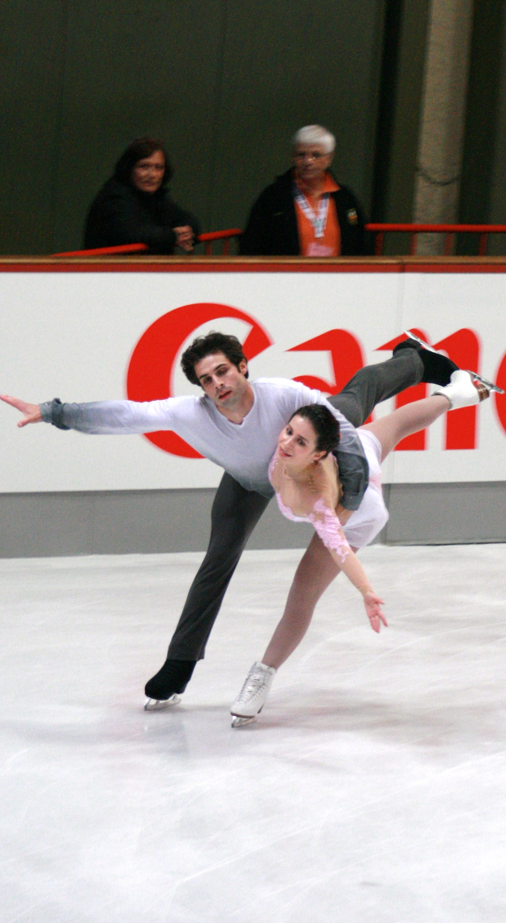 Линдси Девис и Рокни Брубекер (США) на 2013 Nebelhorn Trophy.